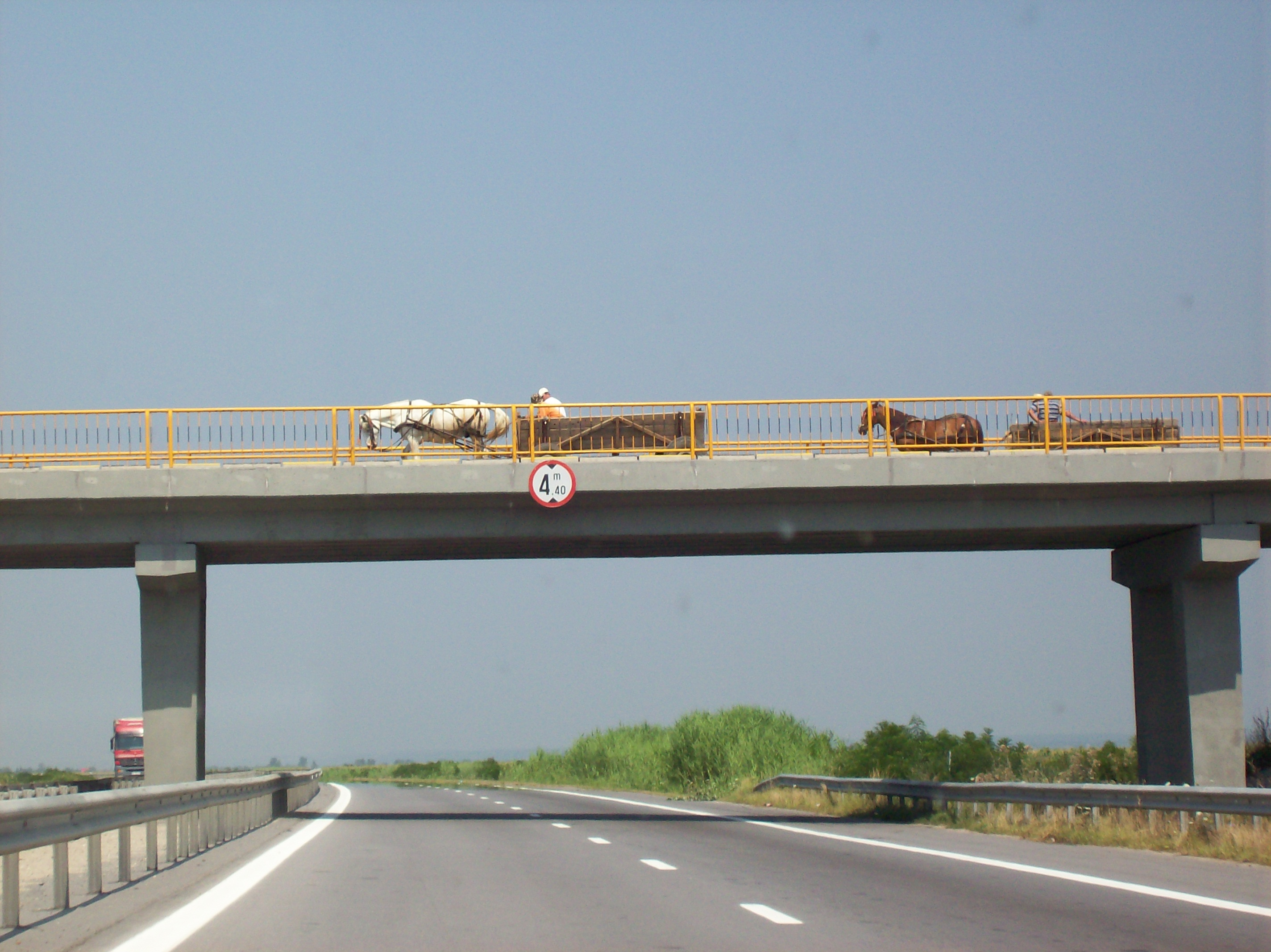 Paardenwagens, Roemenië